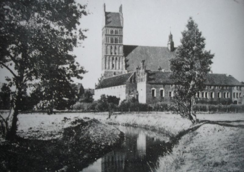 Stara pocztówka z Dobrego Miasta